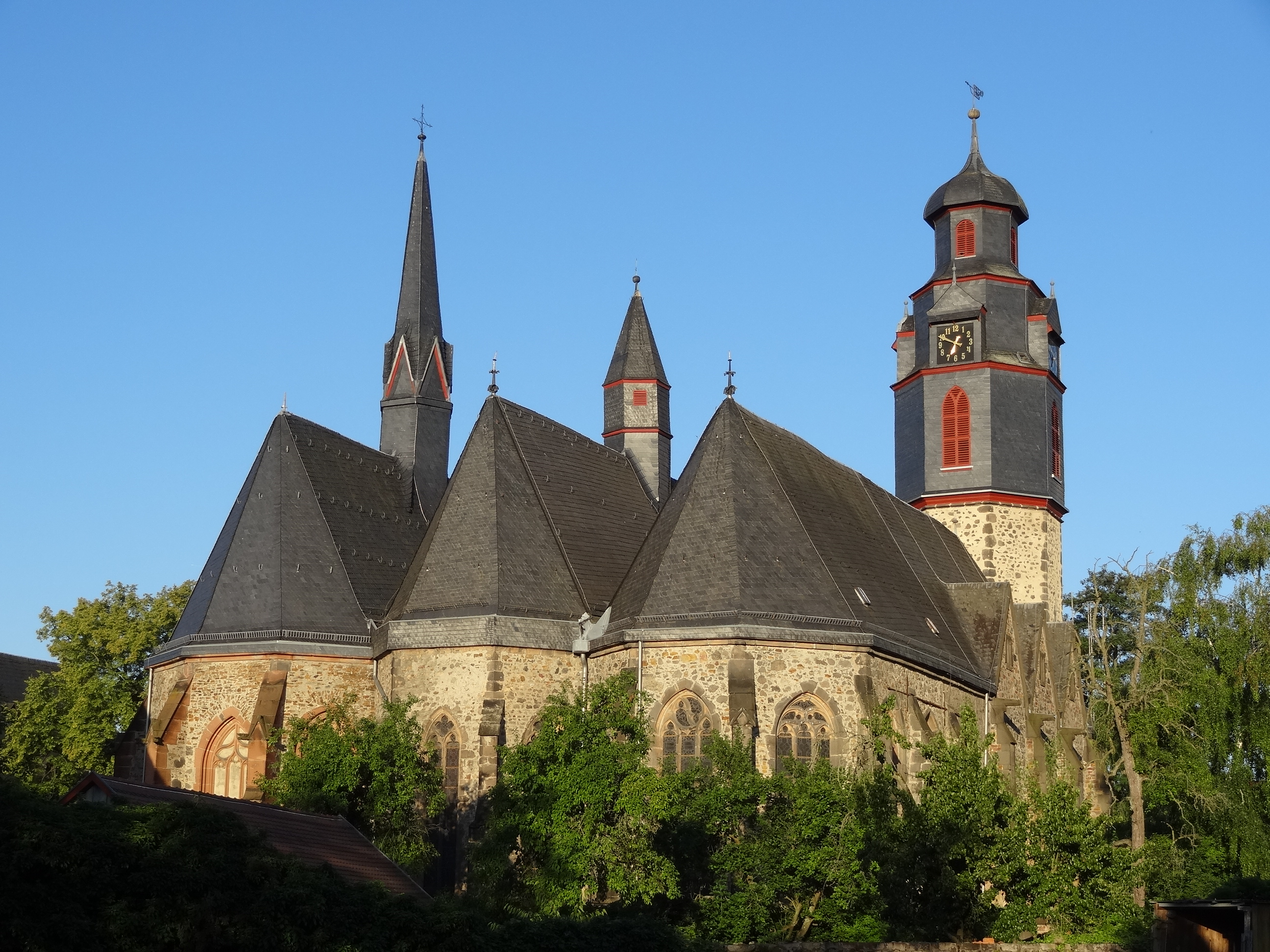 Exterior of Markuskirche (Butzbach)